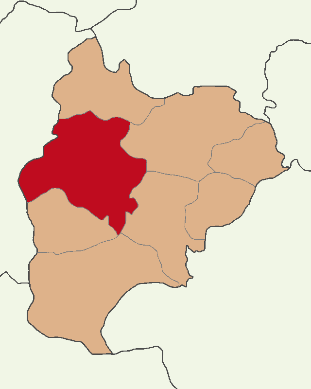 Bilecik Merkez ilçesinin konumu